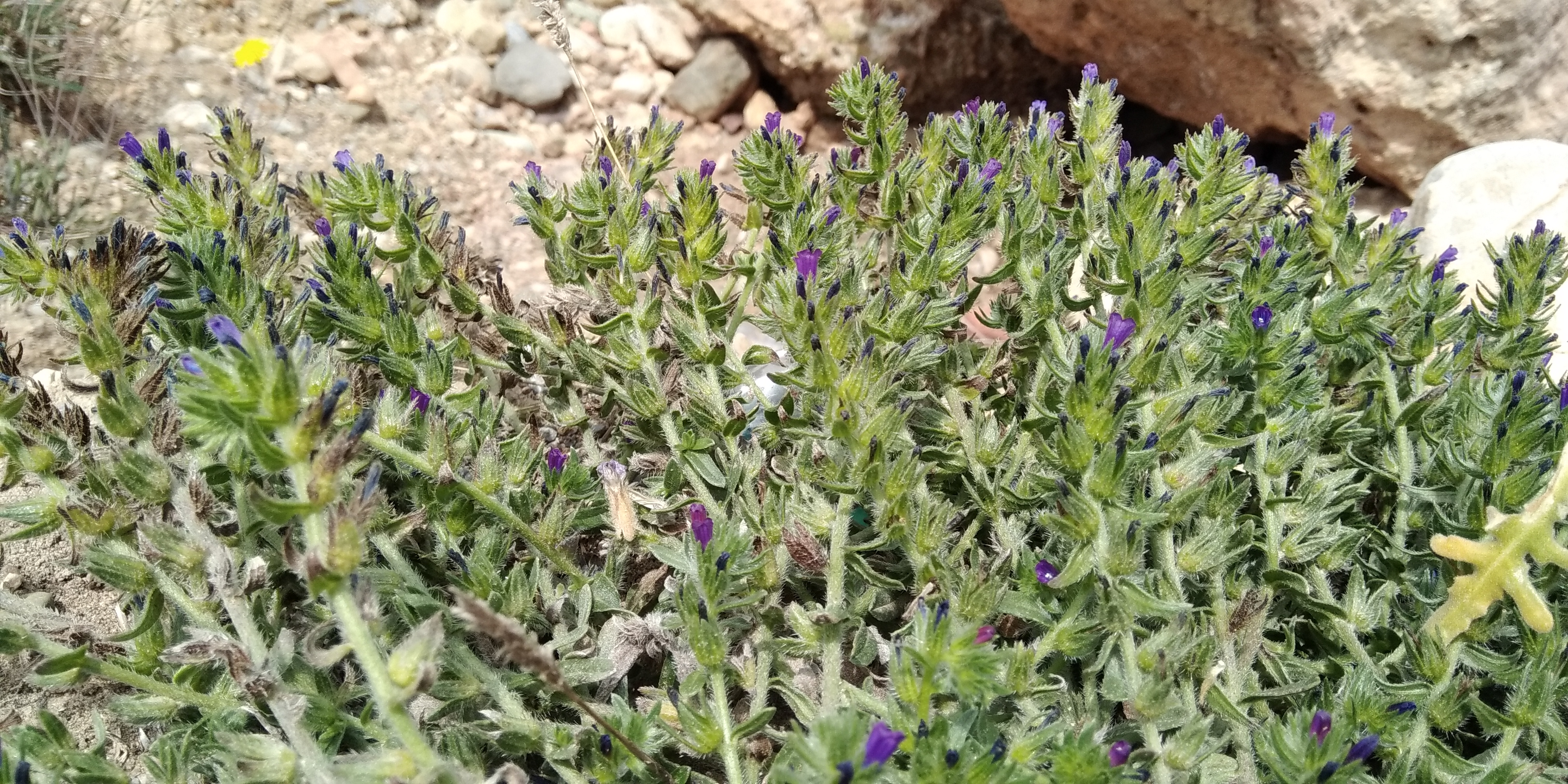 Echium arenarium sur la plage de Demonia en Laconie